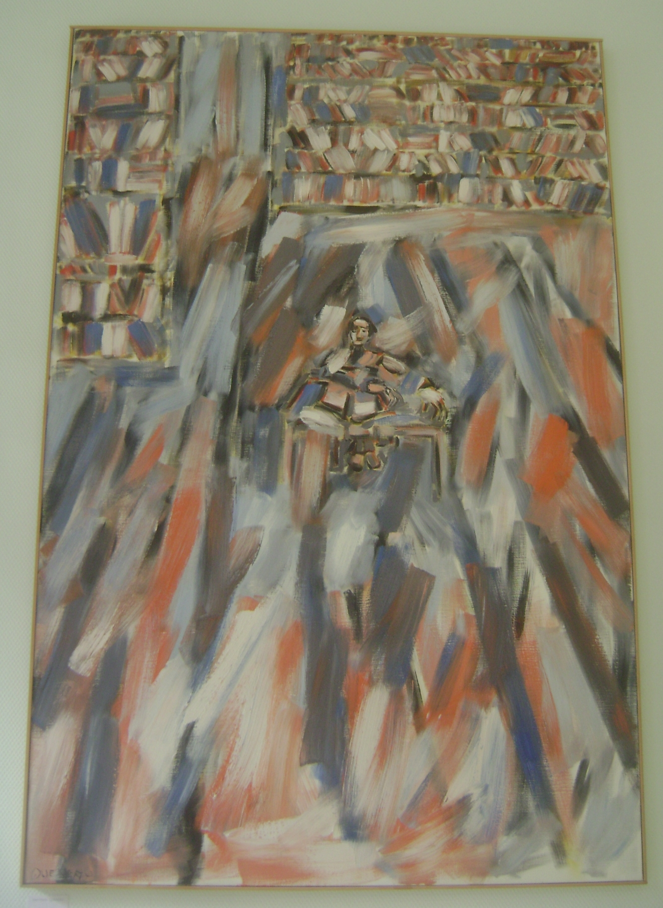 Bibliothèque, tableau sans date de Jean-Marie Queneau